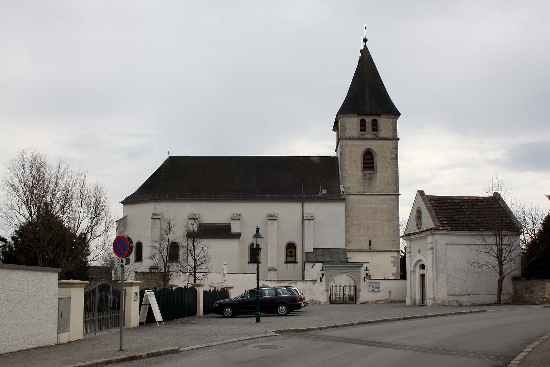 Die kath. Pfarrkirche hl. Kunigunde in der burgenländischen Marktgemeinde Breitenbrunn am Neusiedler See.